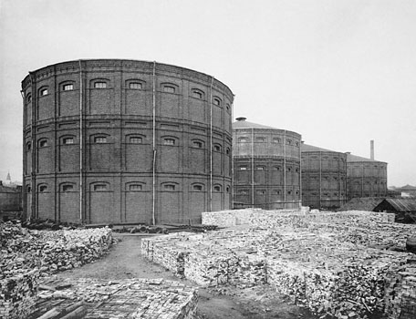 171. Газовый заводъ. Газгольдеры. (Москва)